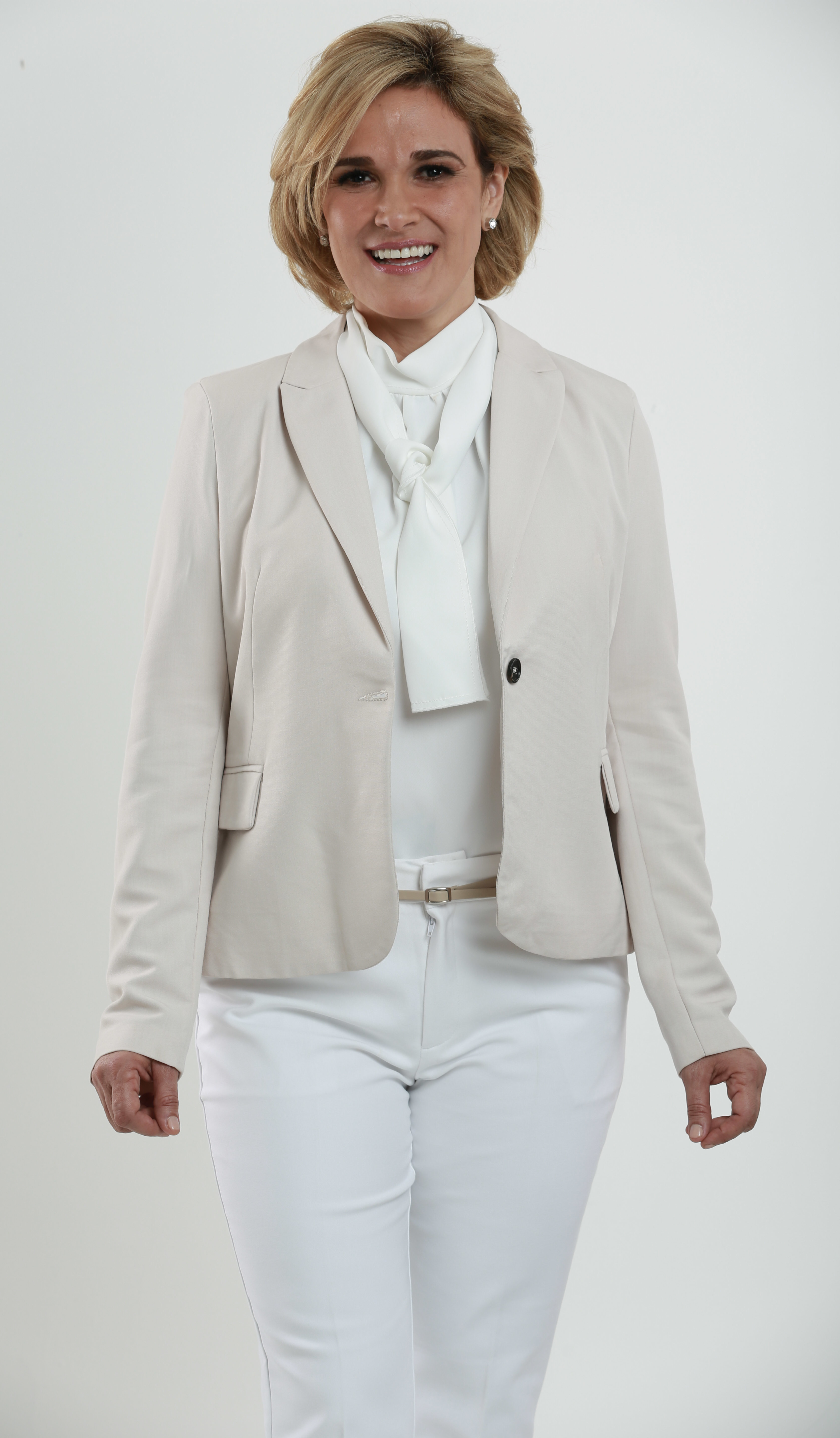 Cynthia Viteri Jiménez en 2018